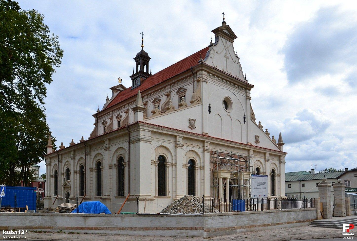 Katedra Zmartwychwstania Pańskiego i św. Tomasza Apostoła - widok od strony pałacu Zamoyskich.